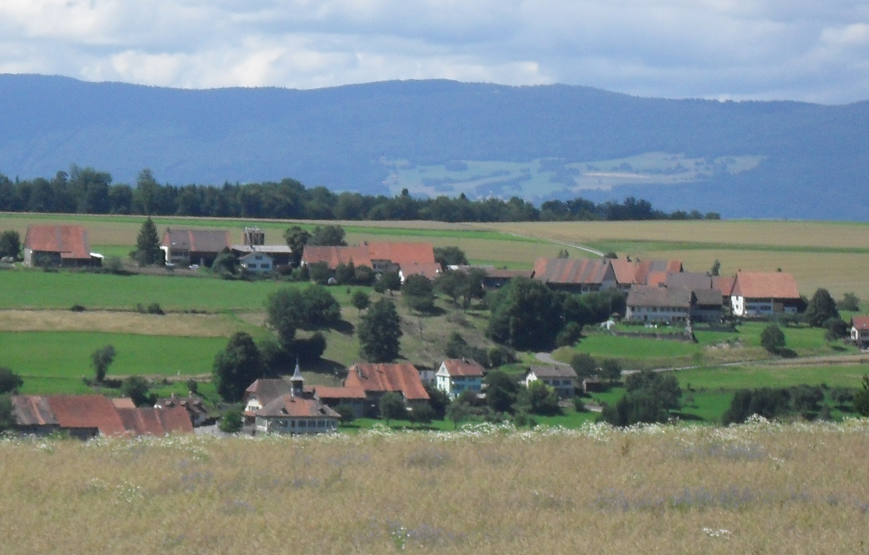 Vue de Denezy